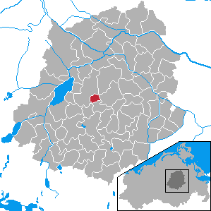 Hohenbollentin, Landkreis Demmin, Mecklenburg-Vorpommern